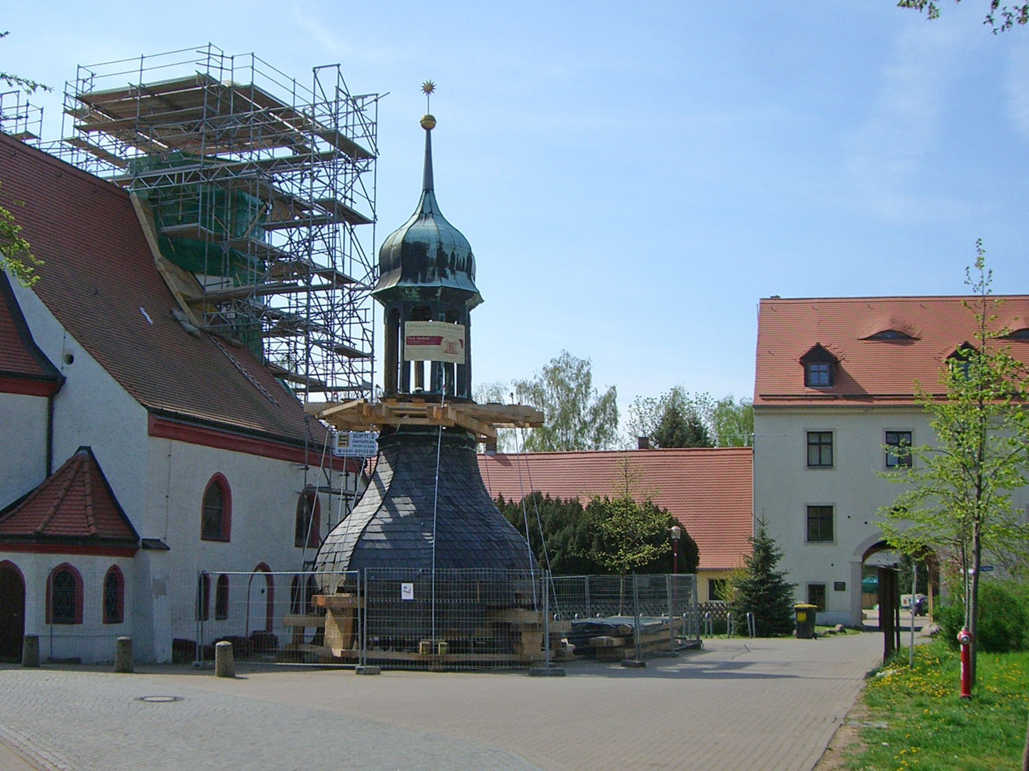 Reparatur der Turmes der Markkleeberger Auenkirche